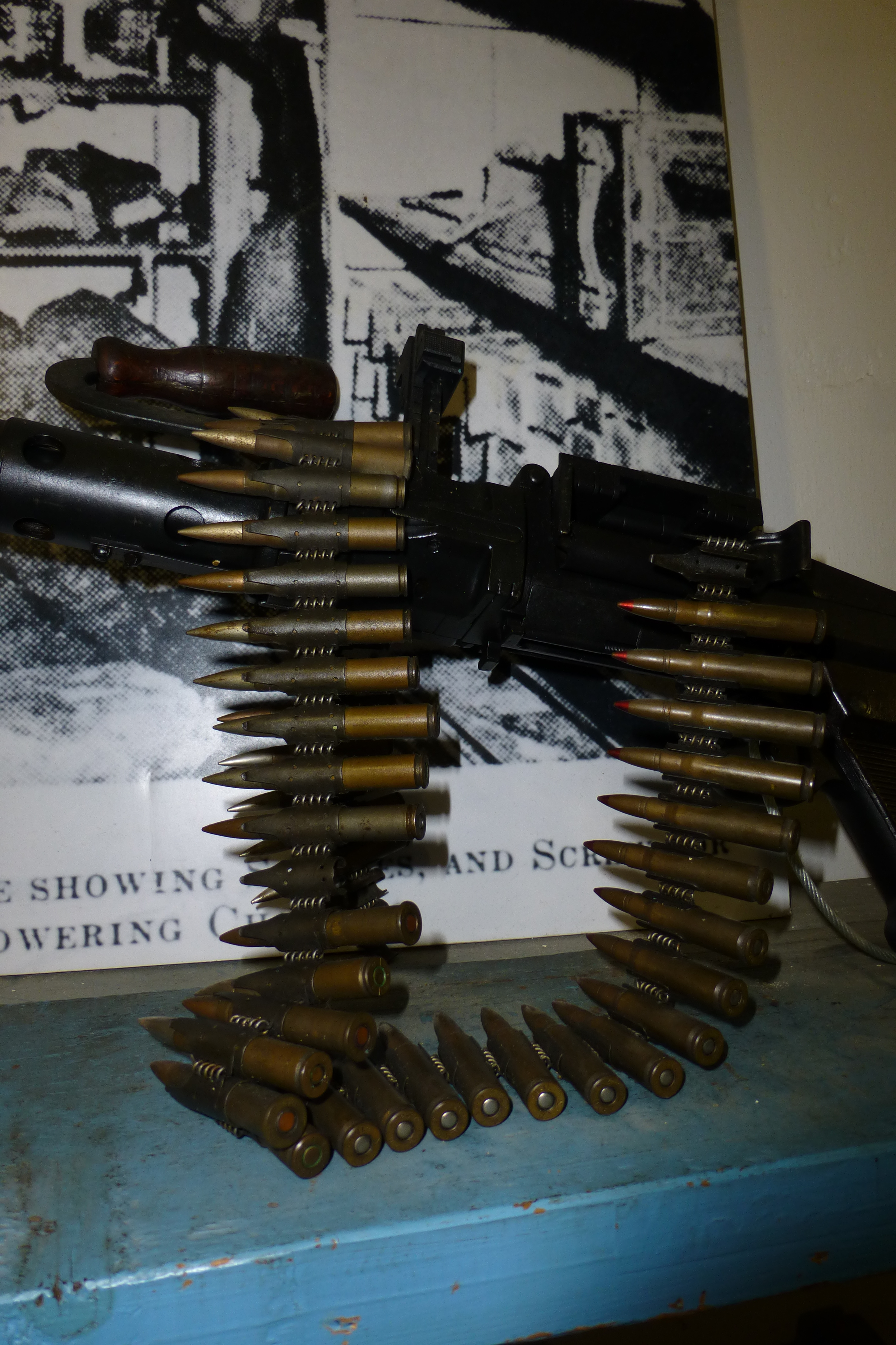 הסליק בקיבוץ יגור, סליק ארצי - נבנה בשנים 1937 - 1938. זה היה הסליק המרכזי בצפון הארץ. הסליק התפרסם כשנתגלה בעת חיפוש שנערך בקיבוץ בזמן השבת השחורה ב-29 ביוני 1946. הבריטים חפשו במשך מספר ימים בעזרת כלבים ומגלי מתכות ולבסוף גילו את הסליק המרכזי ועוד 25 סליקים קטנים. הנשק שהיה בסליקים הוחרם וחלק מחברי הקיבוץ נאסרו. זה היה אחד הסליקים הגדולים שבו נתפסו כ- 80 מרגמות 52 מ"מ, עשרות רובים תת-מקלעים ותחמושת רבה. הסליק המרכזי שנותר ריק לחלוטין מאז השבת השחורה, שוחזר ושופץ בשנת 1983 במסגרת חגיגות ה- 60 לקיבוץ.